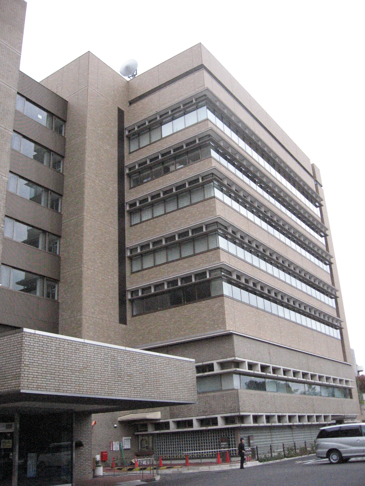 武蔵野市役所西棟、防災安全センター。2007年春に増築完成した。